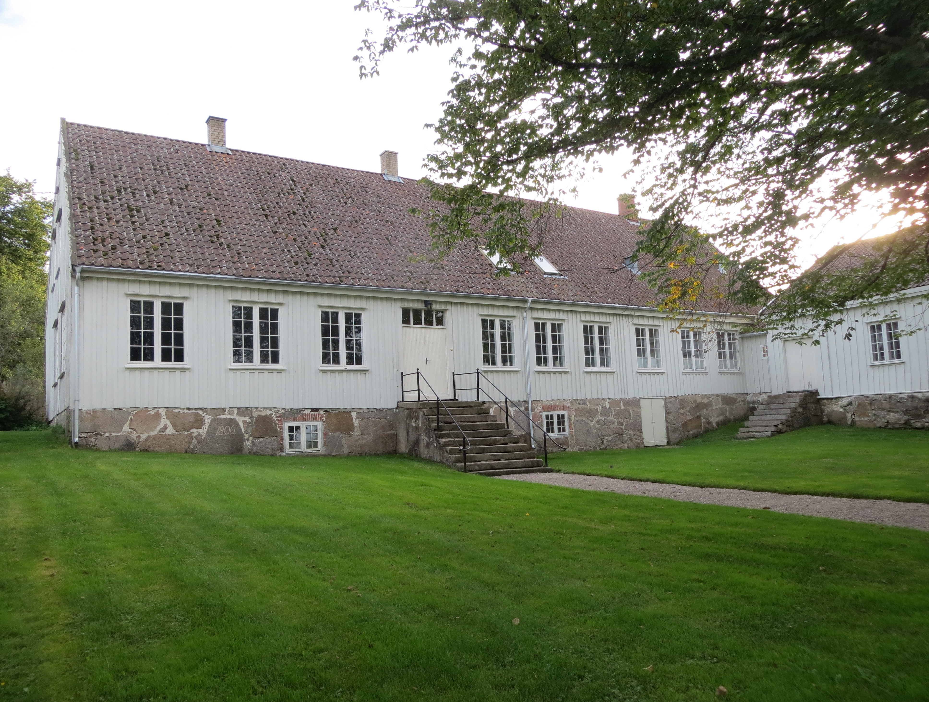 Skjeberg prestegård er fra 1700-tallet. Sarpsborg kommune.